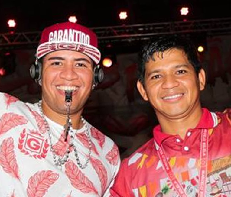 Sopa e Bilela